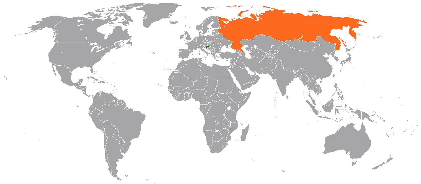 Croatia-Russia locator map.